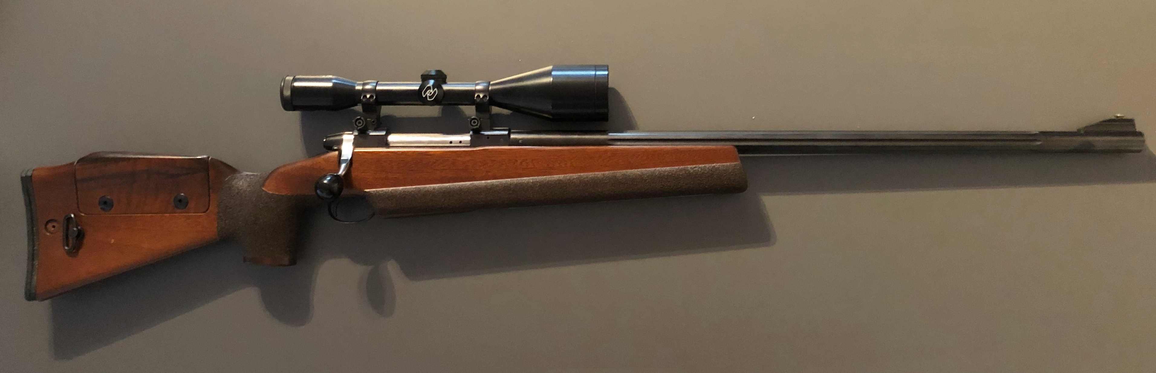 Tikka M65 (hier Ausführung Sporter mit Zieloptik)